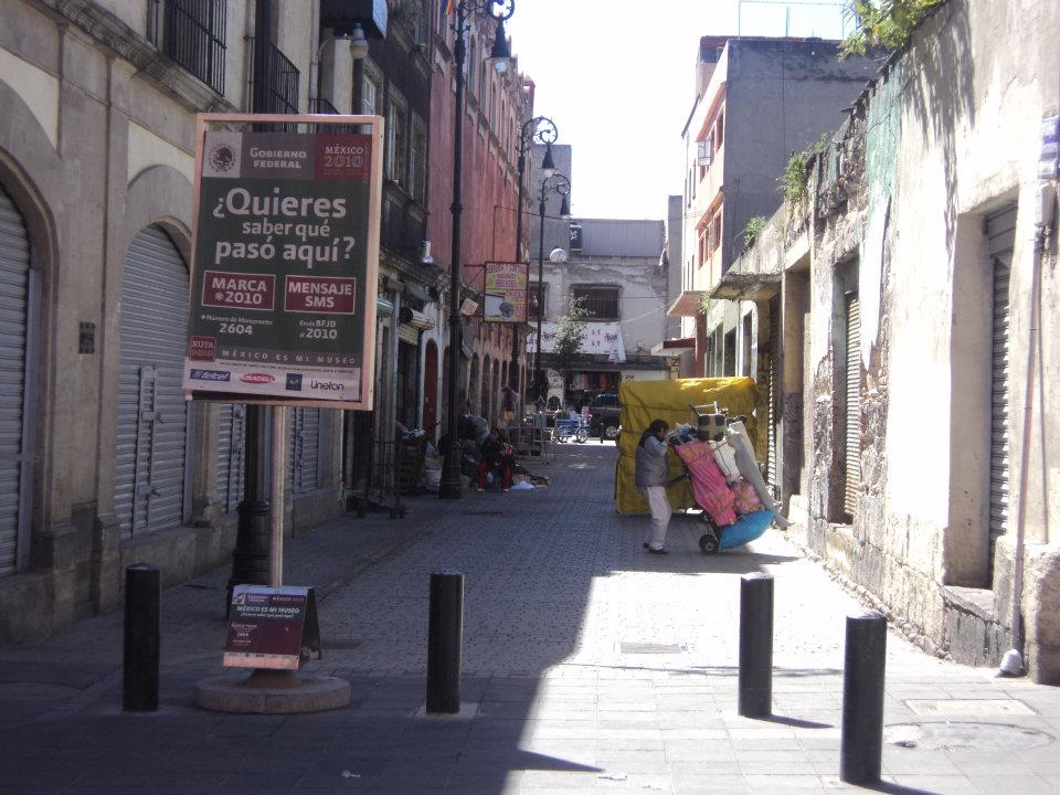 callejon de manzanares